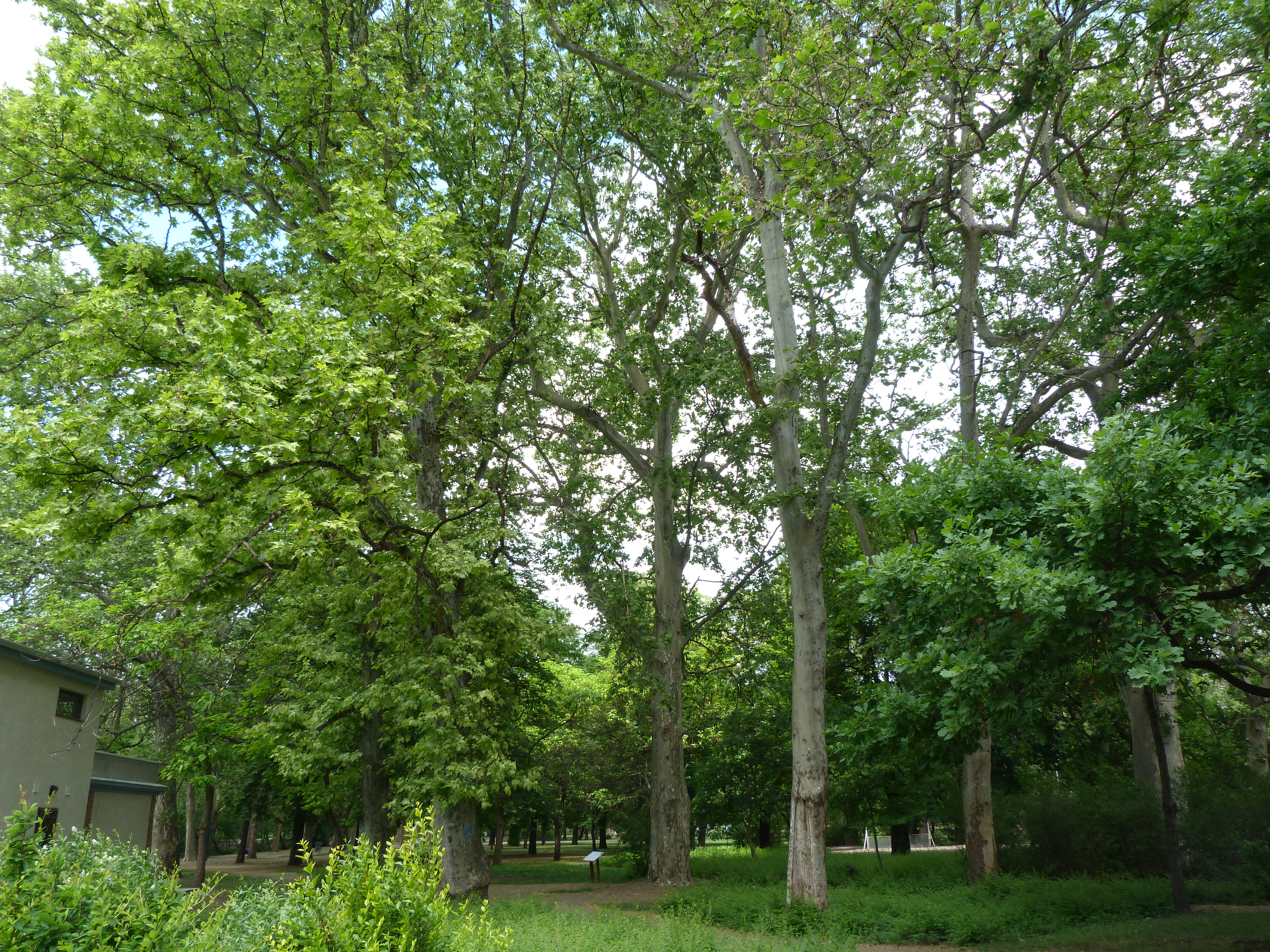 A felvétel 2012. május 19 -én készült Budapesten, a Városligetben. A Városligeti platán törzskerületét 2011 -ben majdnem 420 cm-eresnek mérték. Ebben alapján kort mintegy 150 évesre tették. ©© Derzsi Elekes Andor, Budapest, 2013, A kép és filmfelvételek egészben, vagy részletekben másolását, bármilyen úton történő sokszorosítását és felhasználását a szerző ellenérték nélkül, jogutódjaira is kihatóan megengedi. Az engedély kiterjed a kereskedelmi célú hasznosításra is. Kéri azonban nevének feltüntetését a felhasználás során. A Metapolisz sorozat valamennyi képe és filmje Creative Commons alatti valamint kereskedelmi - for profit - célra is felhasználható. Ajánlott hivatkozás: Derzsi Elekes Andor: Metapolisz DVD line